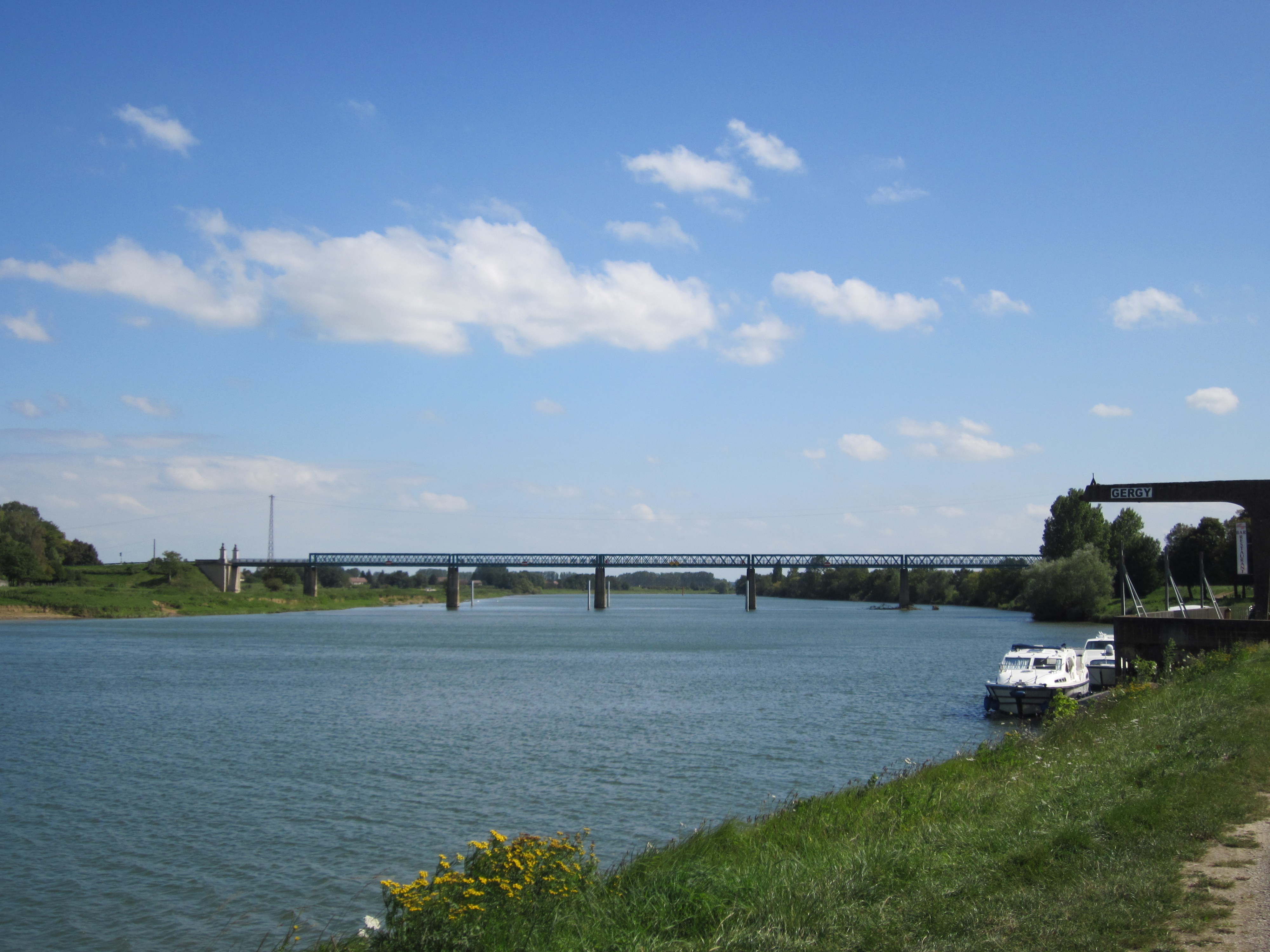 Le pont sur la Saône entre Gergy et Verjux (Saône et Loire)